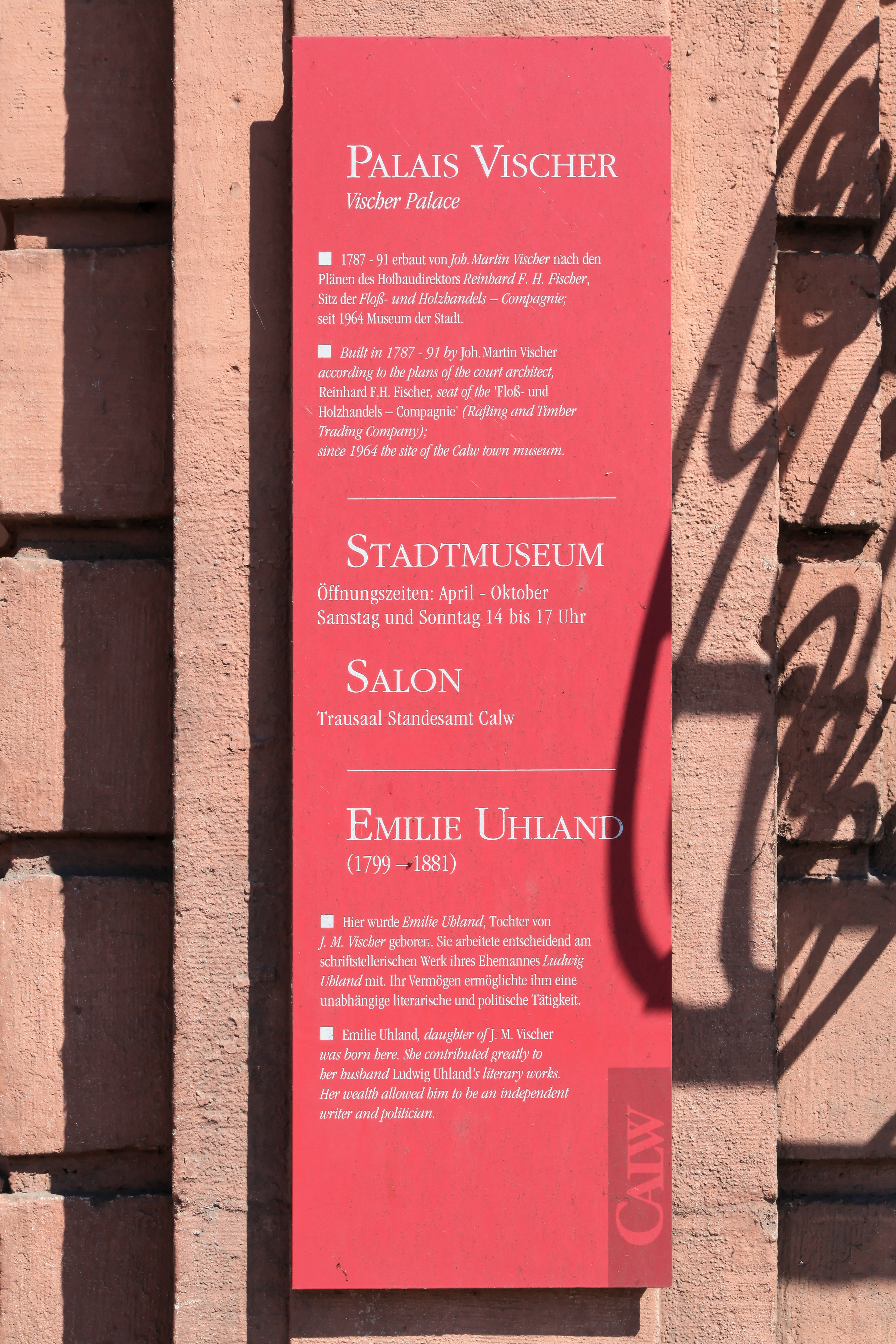 Palais Vischer, Bischofstraße 48 in Calw